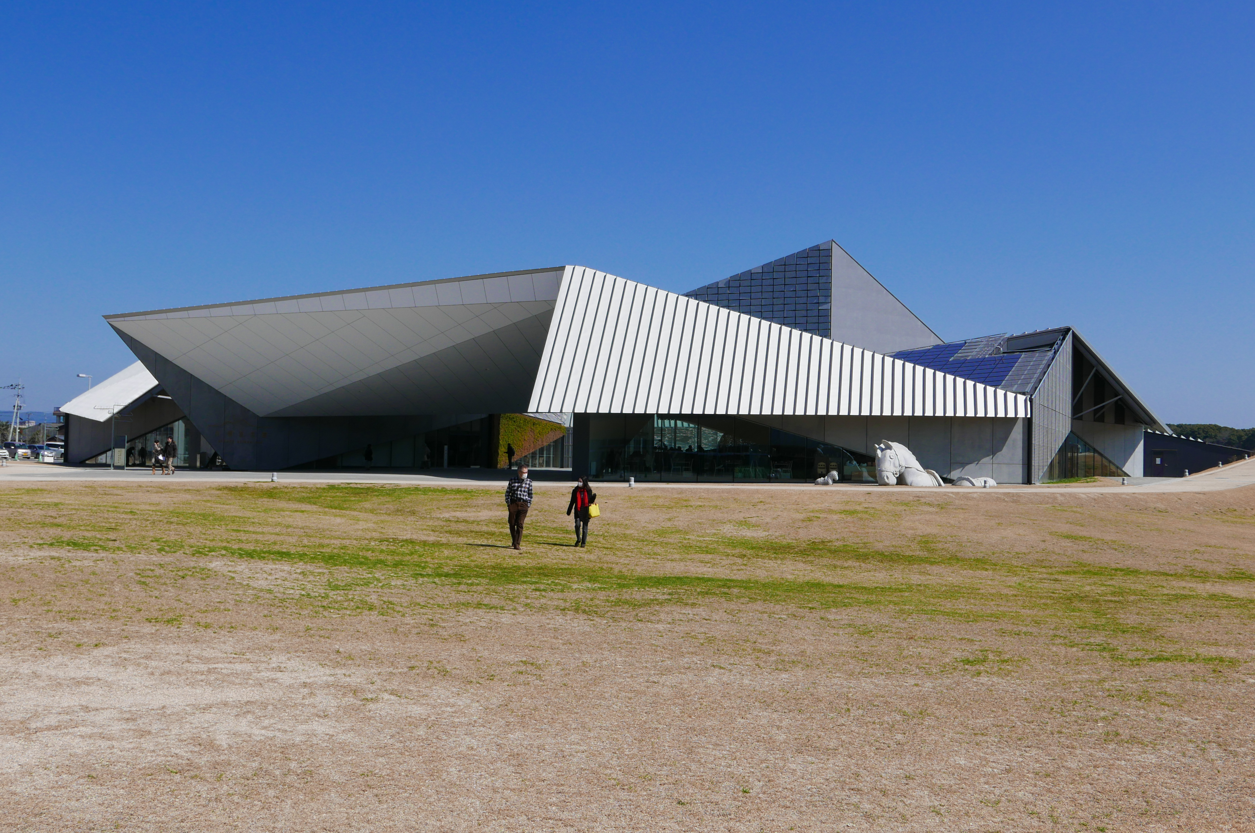 九州芸文館（筑後広域公園芸術文化交流施設）